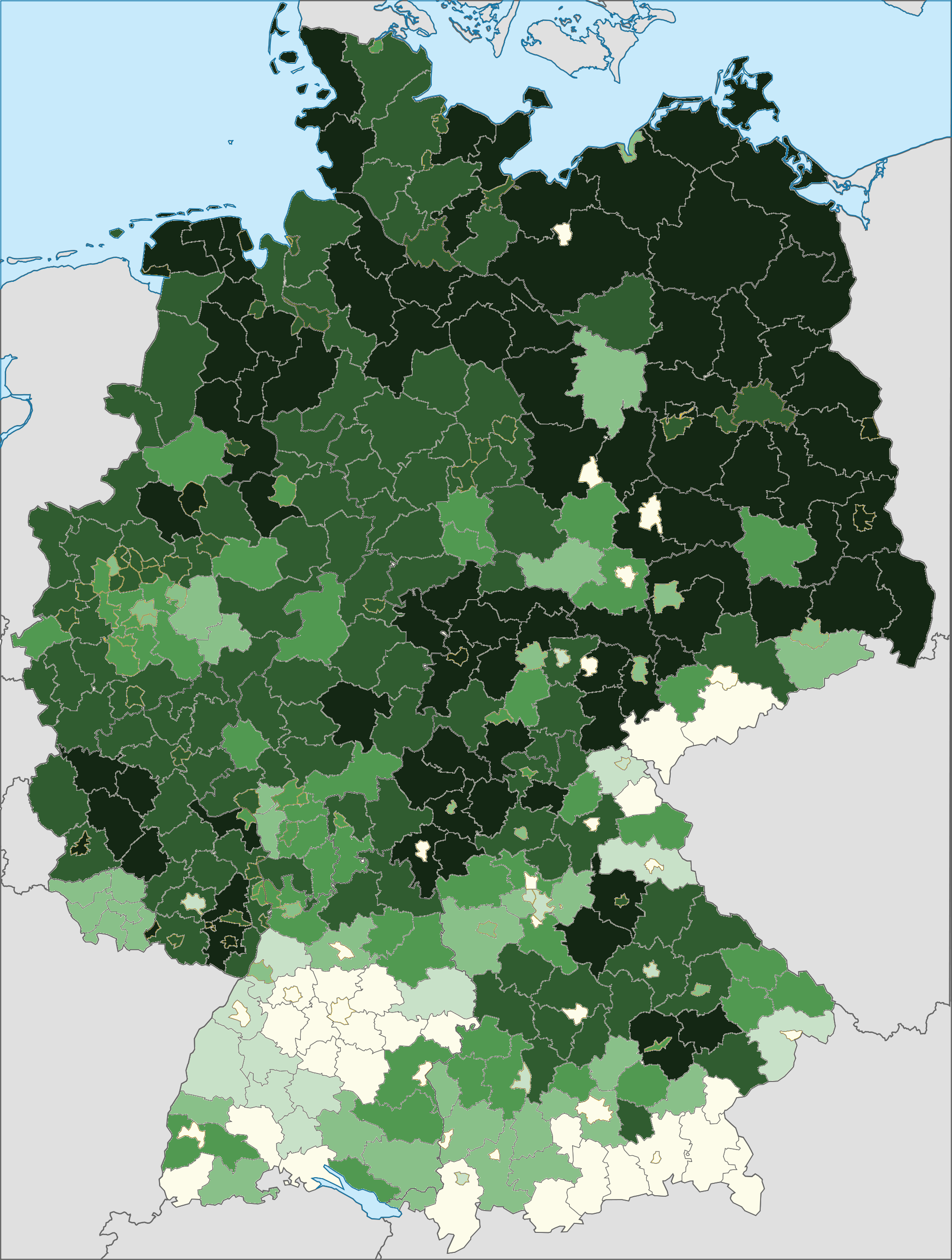 Karte der Personen mit polnischer Staatsangehörigkeit und deren relativer Häufigkeit in den Landkreisen 2014. Dunkelgrün: häufigste ausländische Staatsangehörigkeit in diesem Kreis, hellgrün: fünfthäufigste ausländische Staatsangehörigkeit in diesem Kreis, weiß: sechsthäufig oder weniger. Quelle: Ausländerzentralregister, Stand: 31. Dezember 2014. Saarland: keine Daten auf Kreisebene (dargestellt ist die Landesebene). Deutschlandweite relative Häufigkeit der ausländischen Staatsangehörigkeit Polen: Platz 2. häufigste ausländische Staatsangehörigkeit in diesem Kreis fünfthäufigste ausländische Staatsangehörigkeit in diesem Kreis sechsthäufig oder weniger